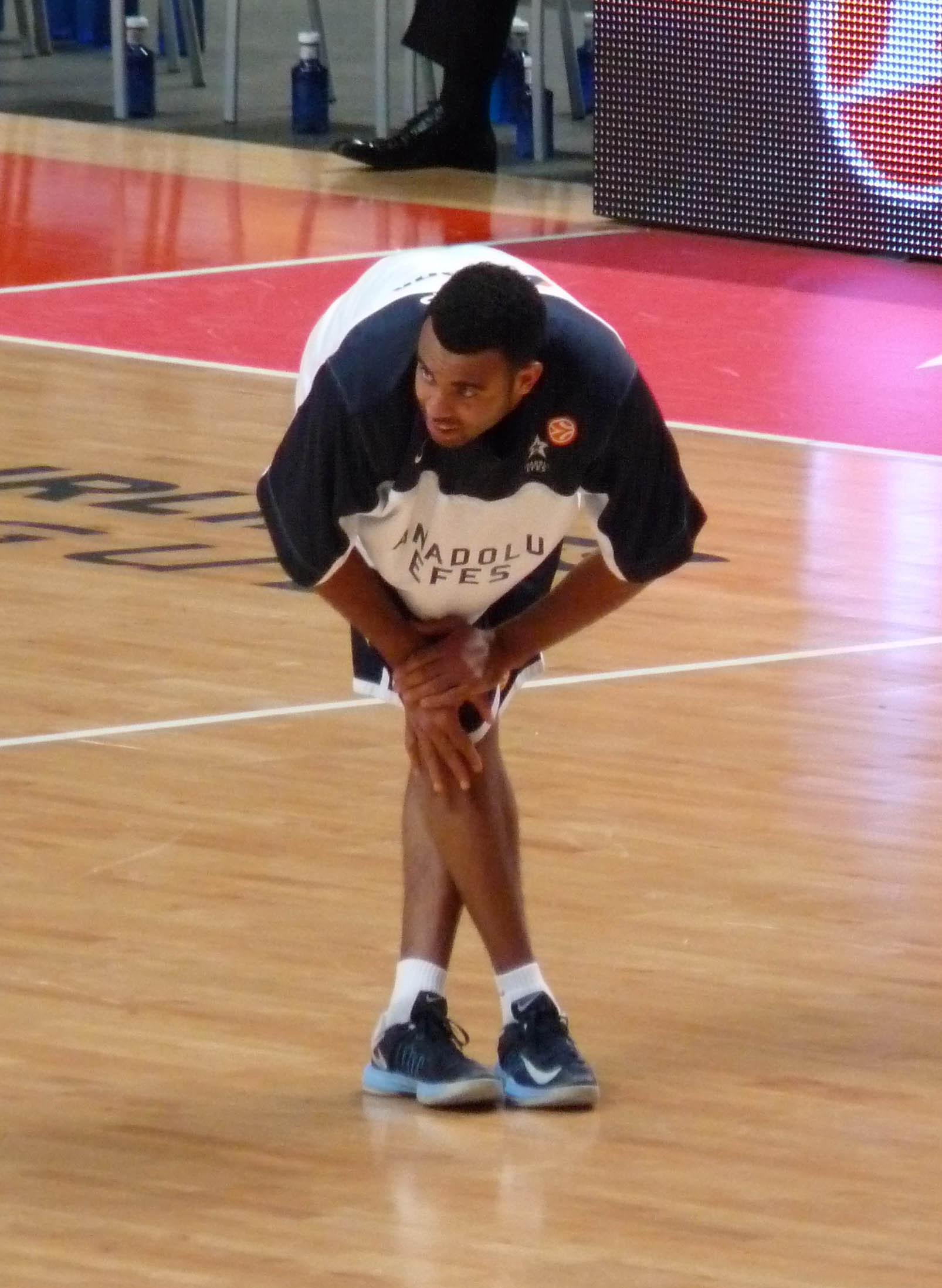 Josh Shipp